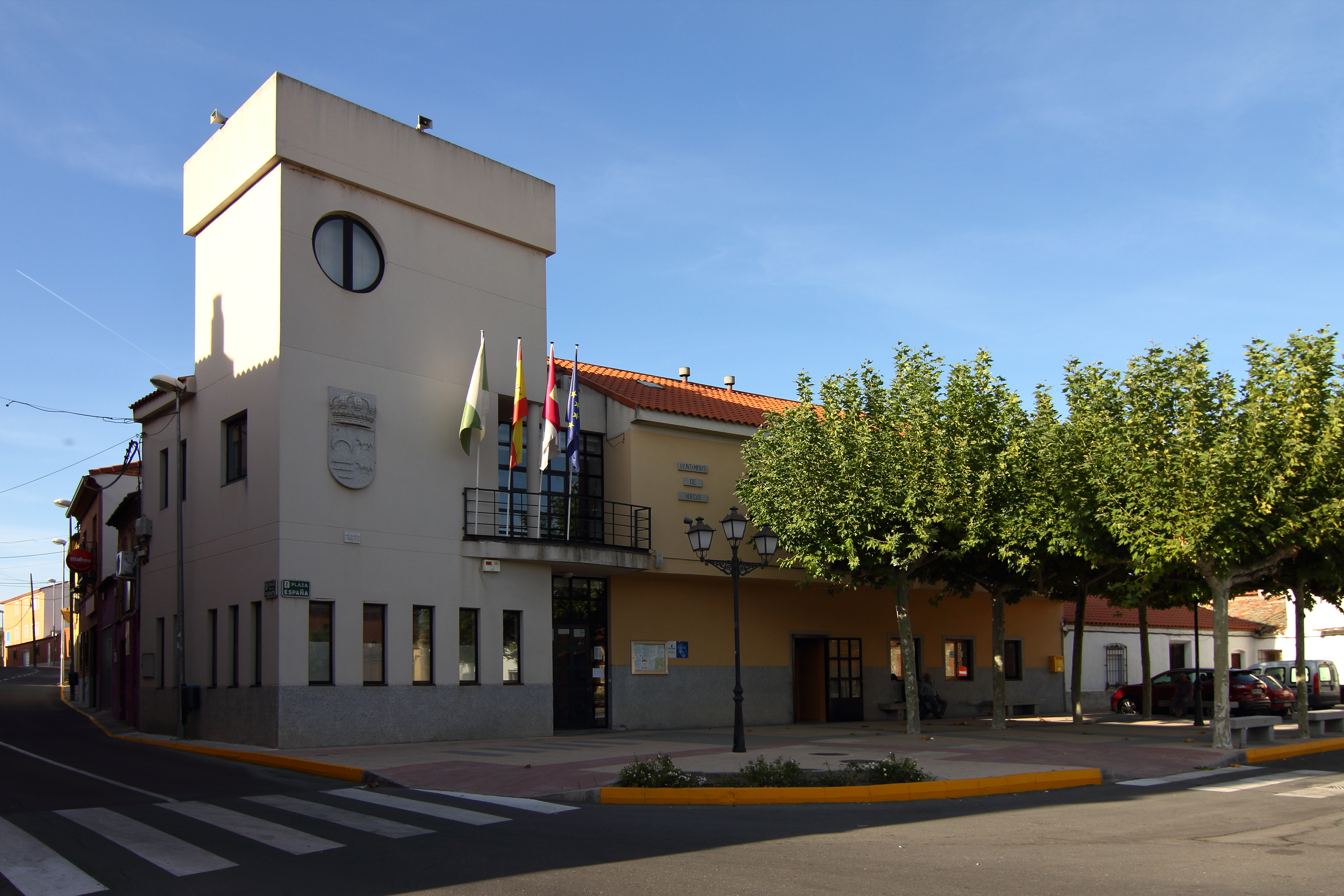 Ayuntamiento de Huecas